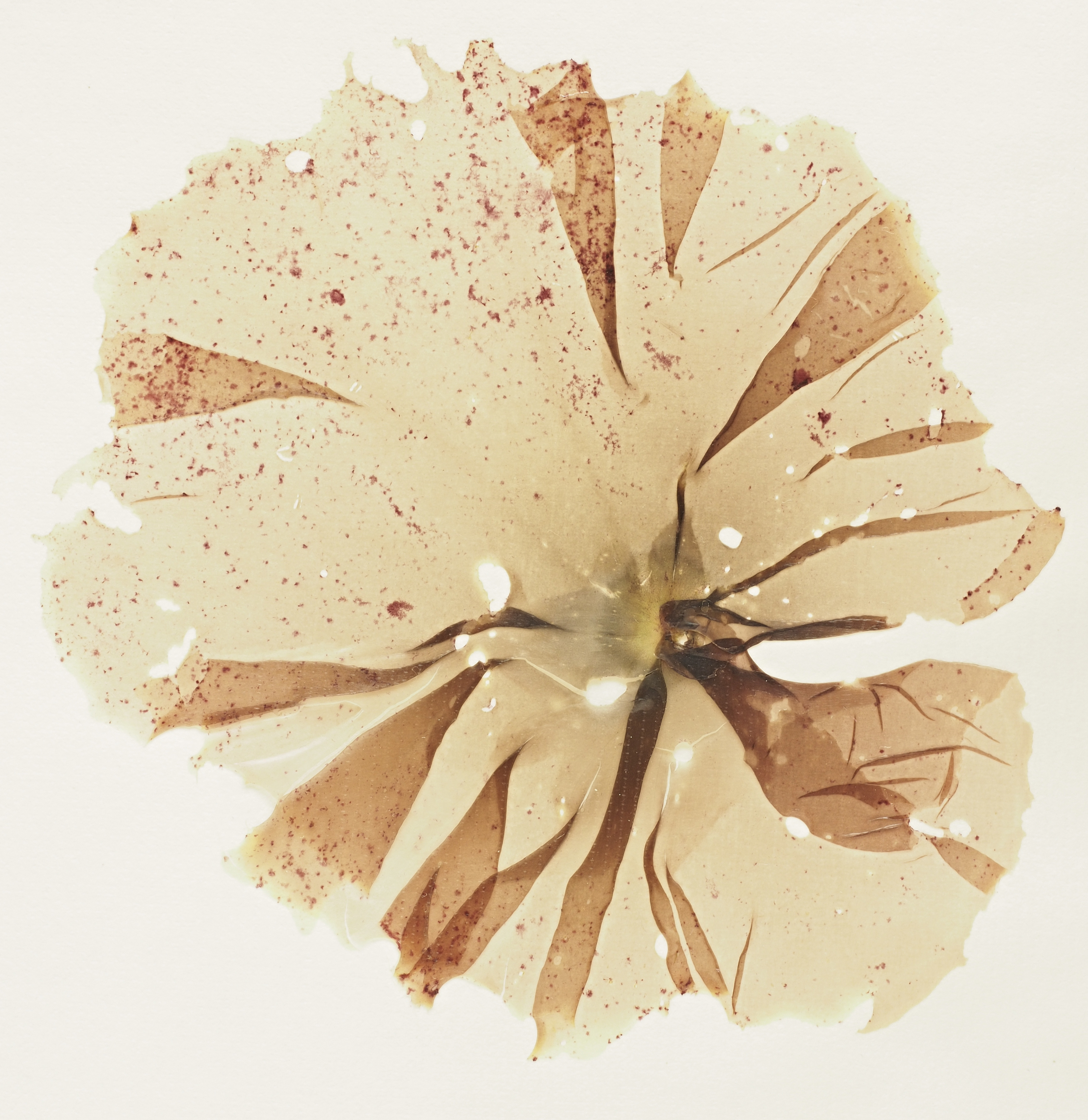 Porphyra umbilicalis Kützing 1843: 383; pliego de herbario. Loc.: Muxía (Costa da Morte, Province of A Coruña, Galicia (Spain)); 1988-06-01; sobre rocas expuestas de litoral medio. Leg. & det. Bartolomé Gil Martínez; L. Fernández phot.’’.